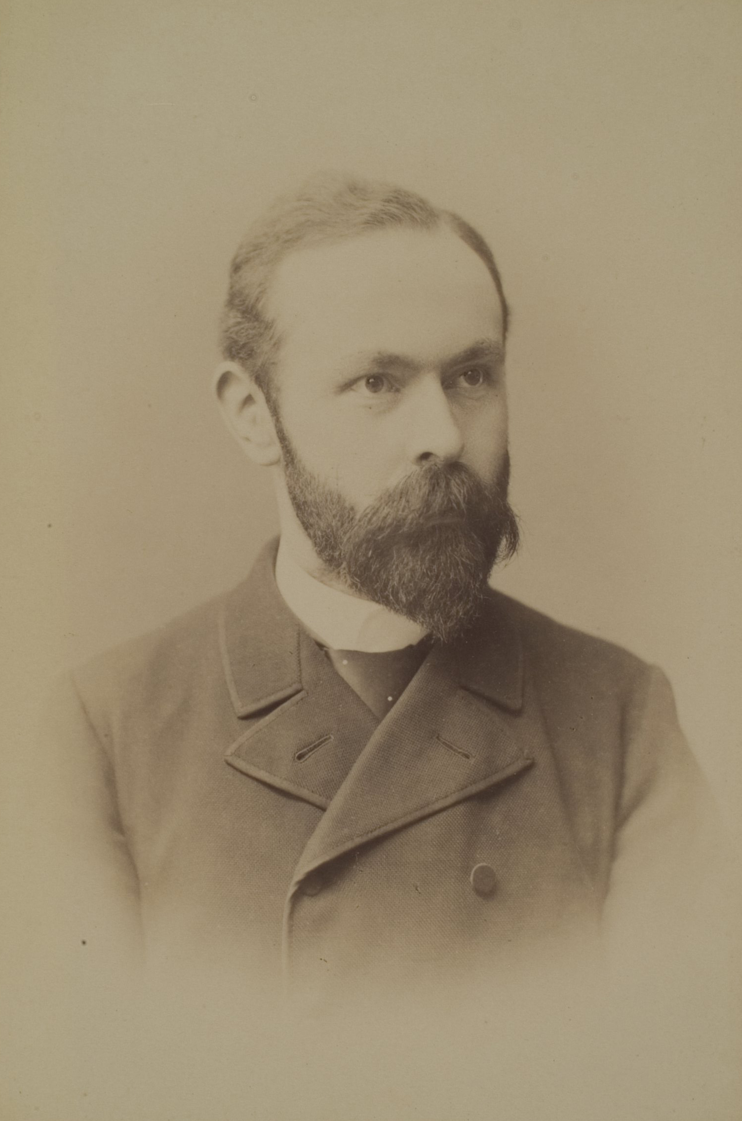 Wilhelm Ludwig Friedrich Emil Krafft, Chemiker, 1888–1923 Professor in Heidelberg